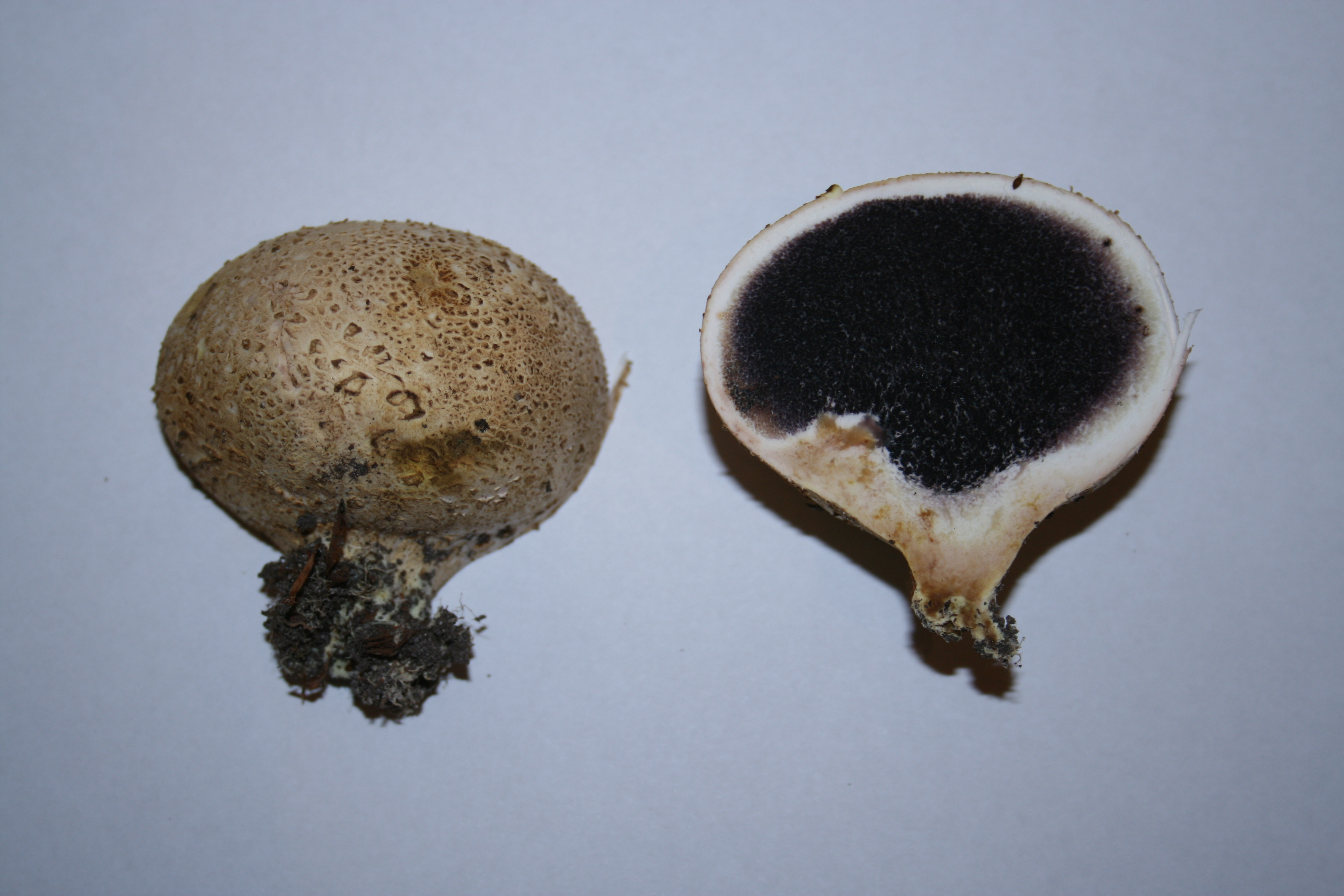 Scleroderma citrinum